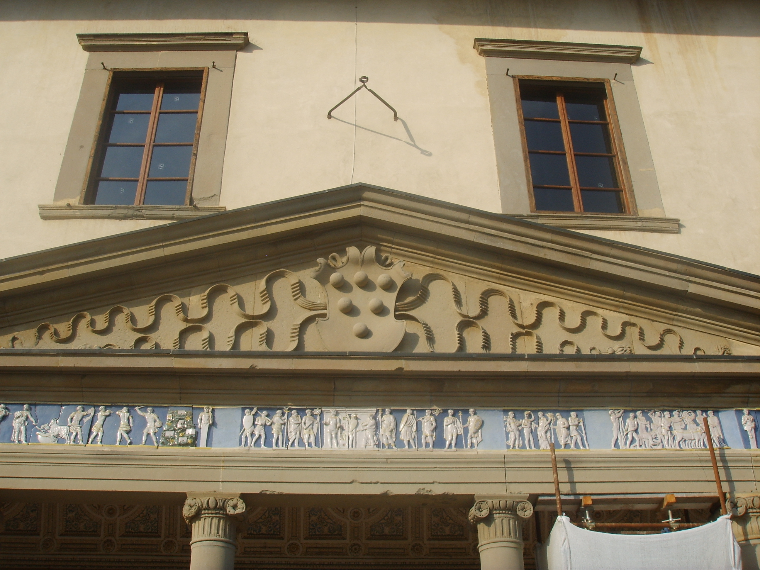 Poggio a Caiano Villa outside view in Poggio a Caiano, Italy